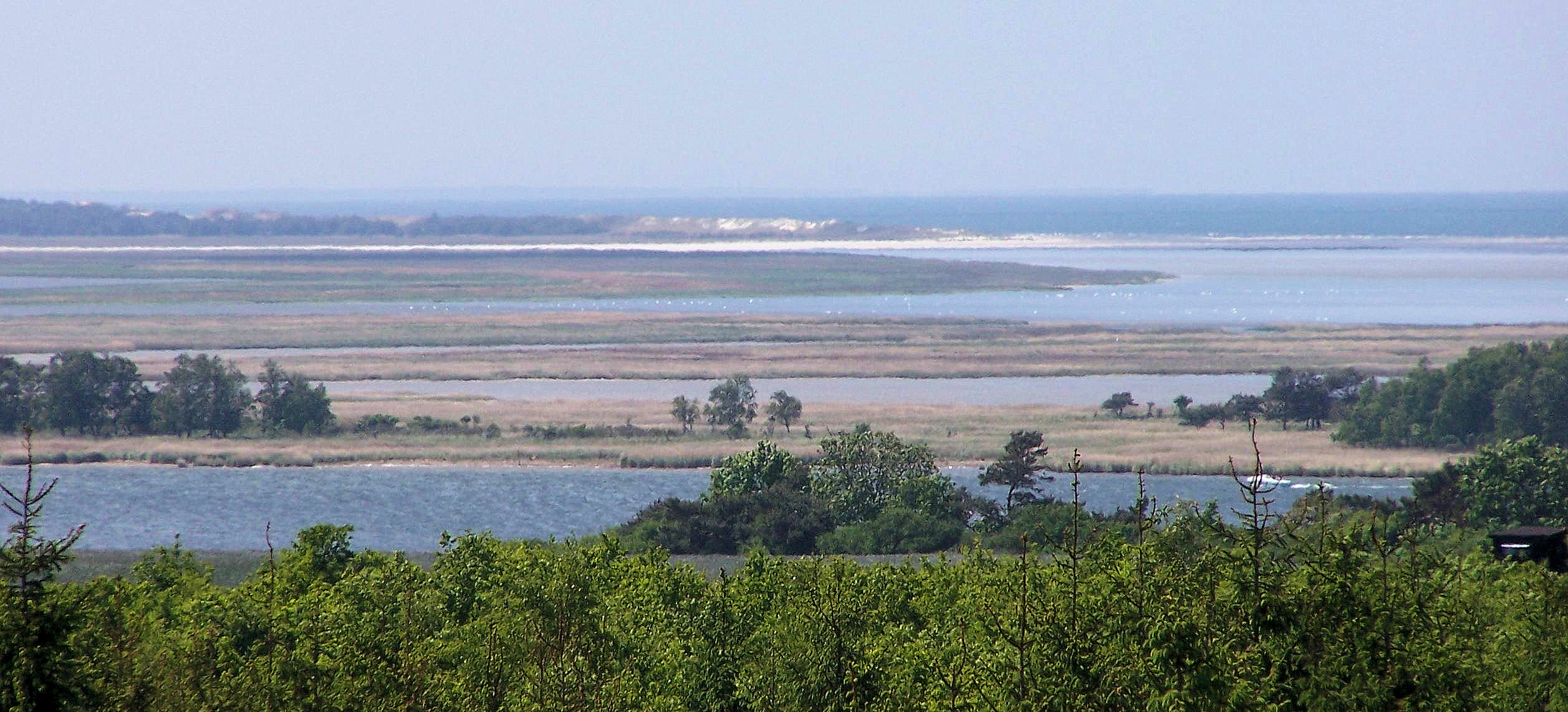 Blick vom Aussichtsturm Barhöft über den Kleinen und Großen Werder zum Zingst